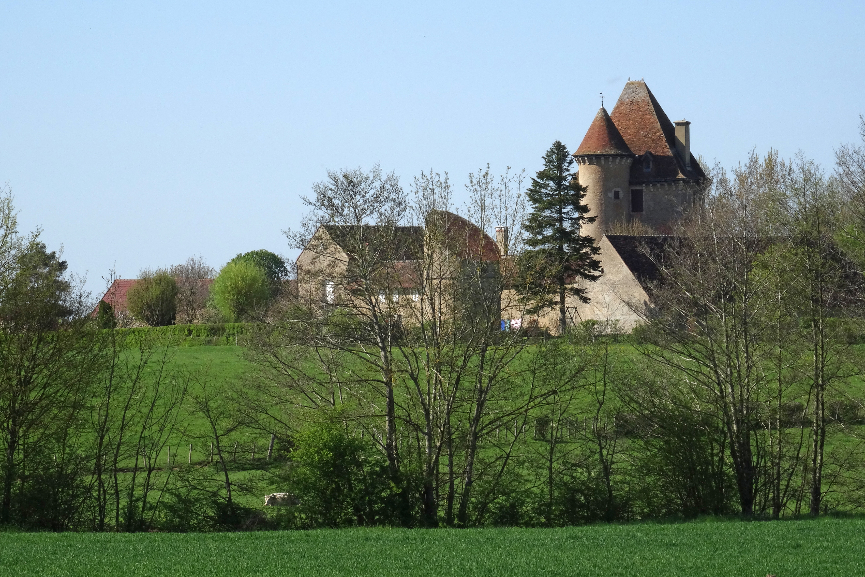 Angely, la tour de Pancy (Yonne)